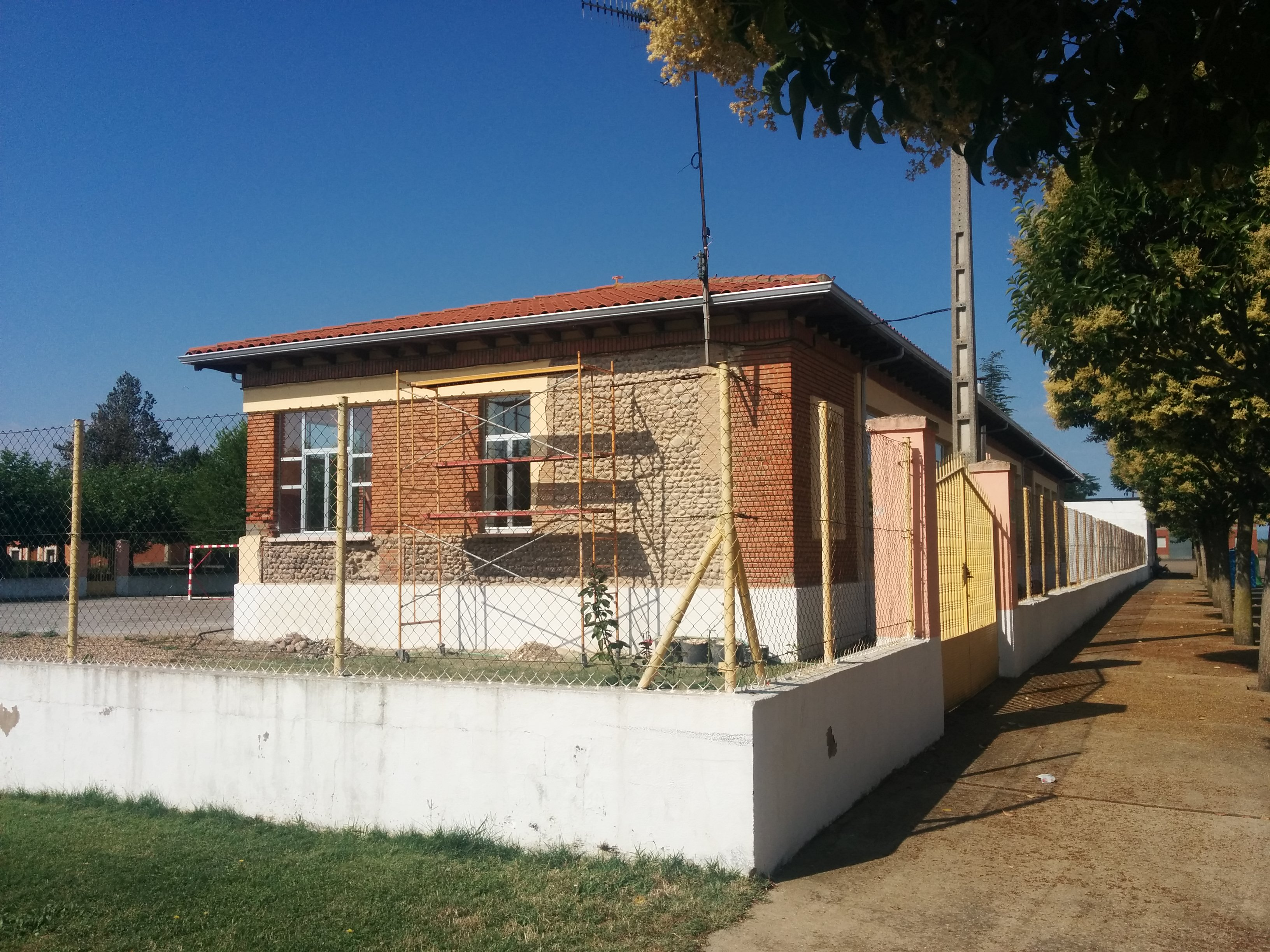 lateral de las escuelas de Urdiales del Páramo